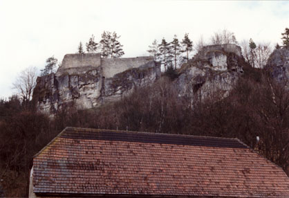 Burg Wolfsberg, Ruine vom Ort aus gesehen